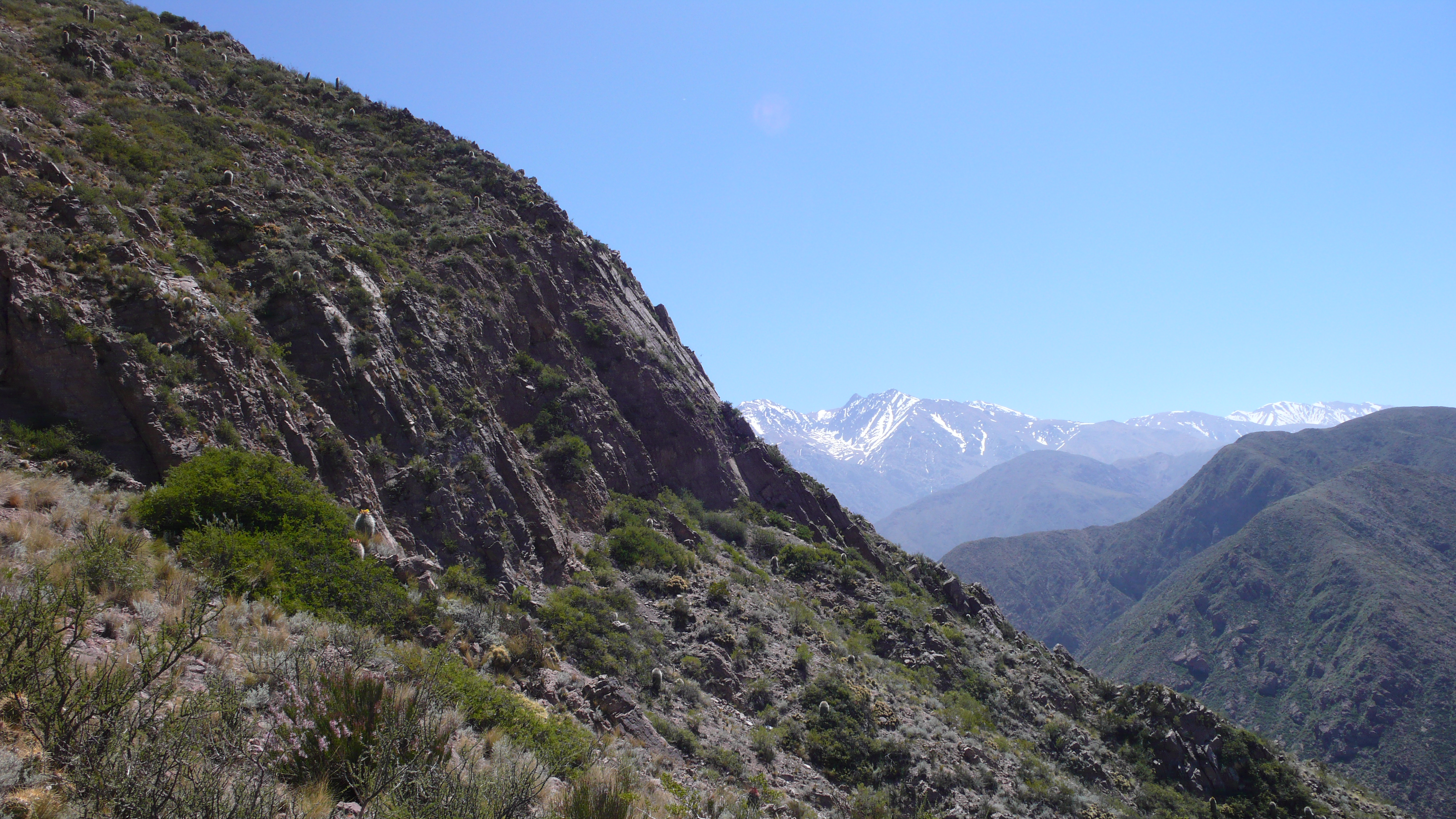 Vista de los Andes desde la cordillera, provincia de Mendoza, Argentina